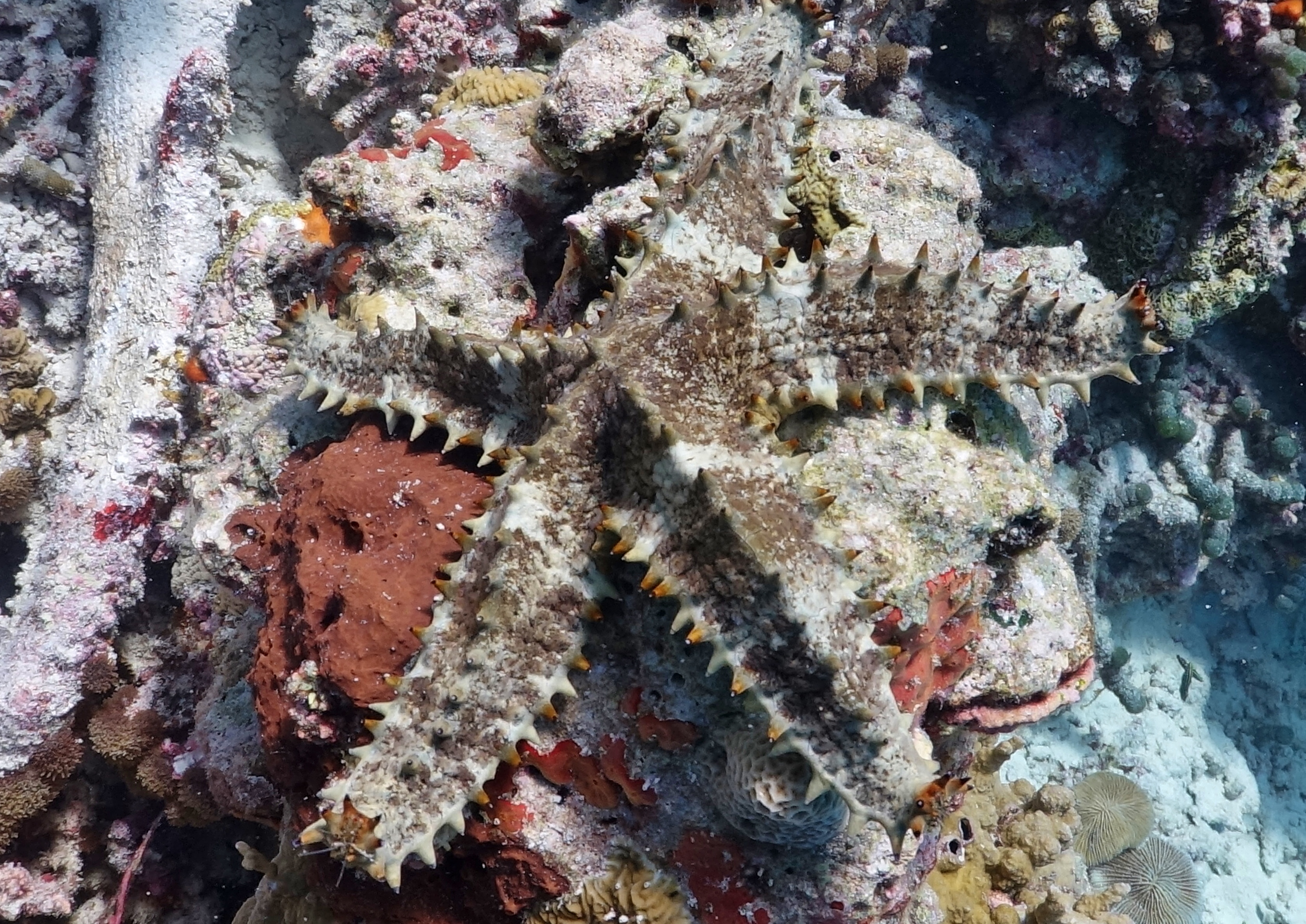 Asteropsis carinifera aux Maldives (atoll de Baa).